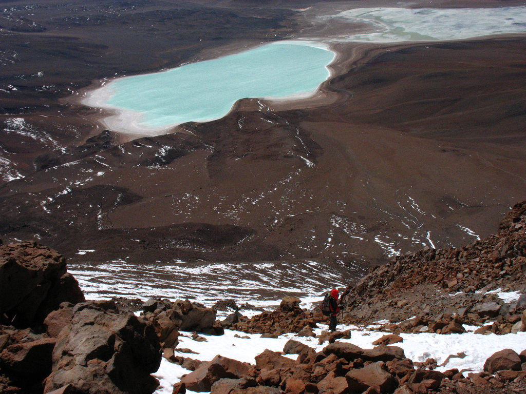 Runa Simi: Q'umirquchawan Yuraqqucha, Likankawur urqumanta rikusqa.